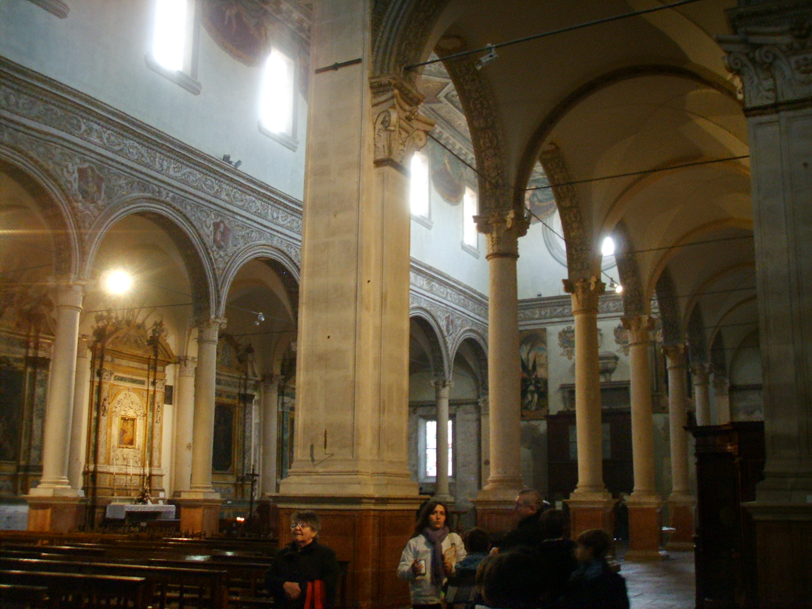 Ferrara, santa maria in vado, interno